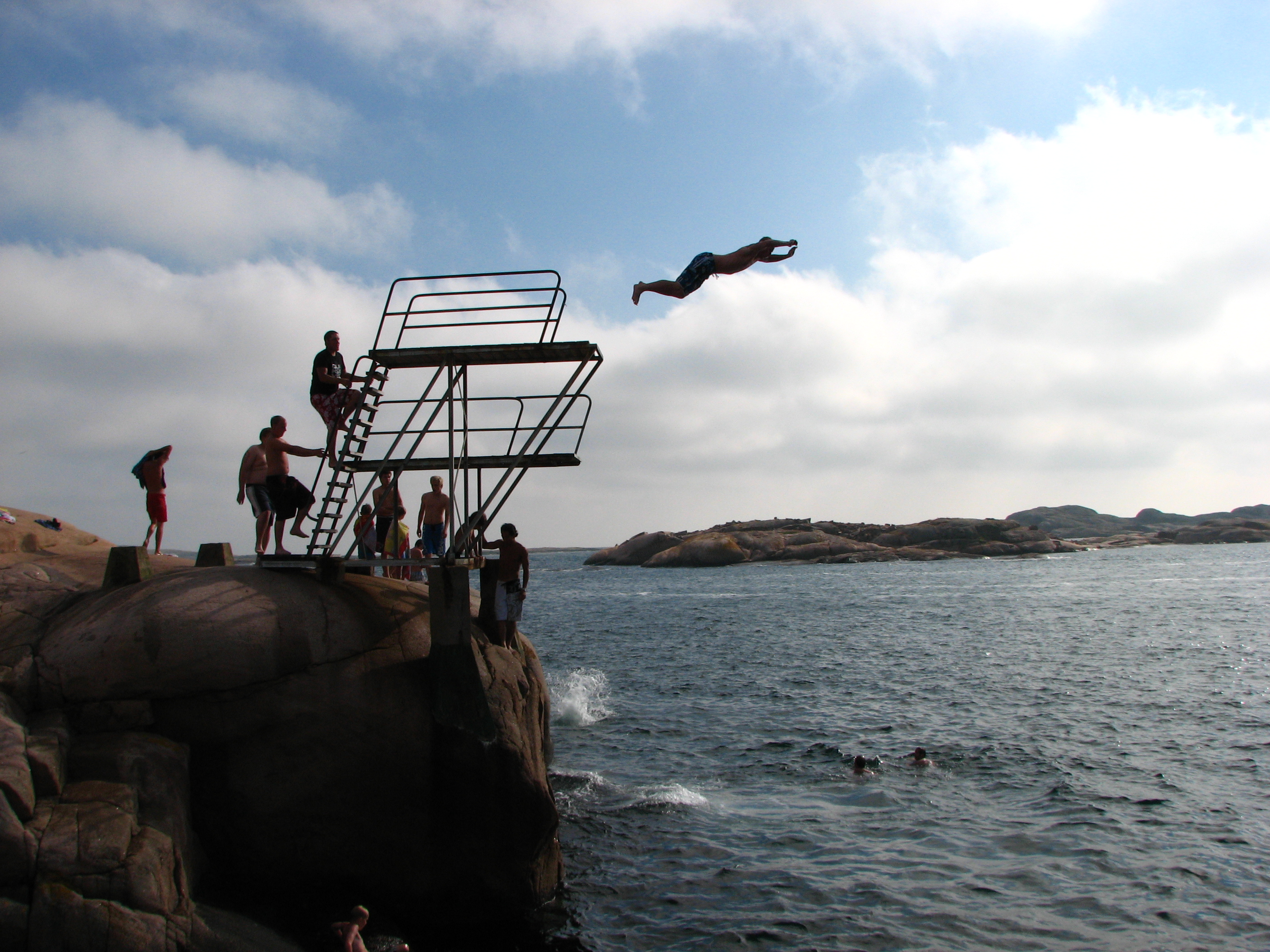 Vallevik, Smögen